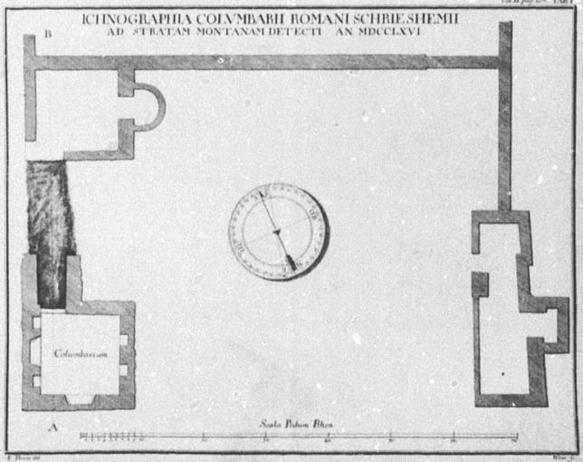 Villa rustica Schriesheim